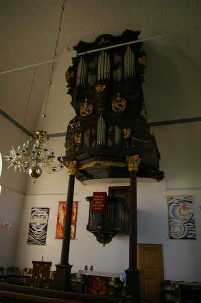 Altar-Kanzel-Orgel-Prospekt der Martin-Luther Kirche Reusrath